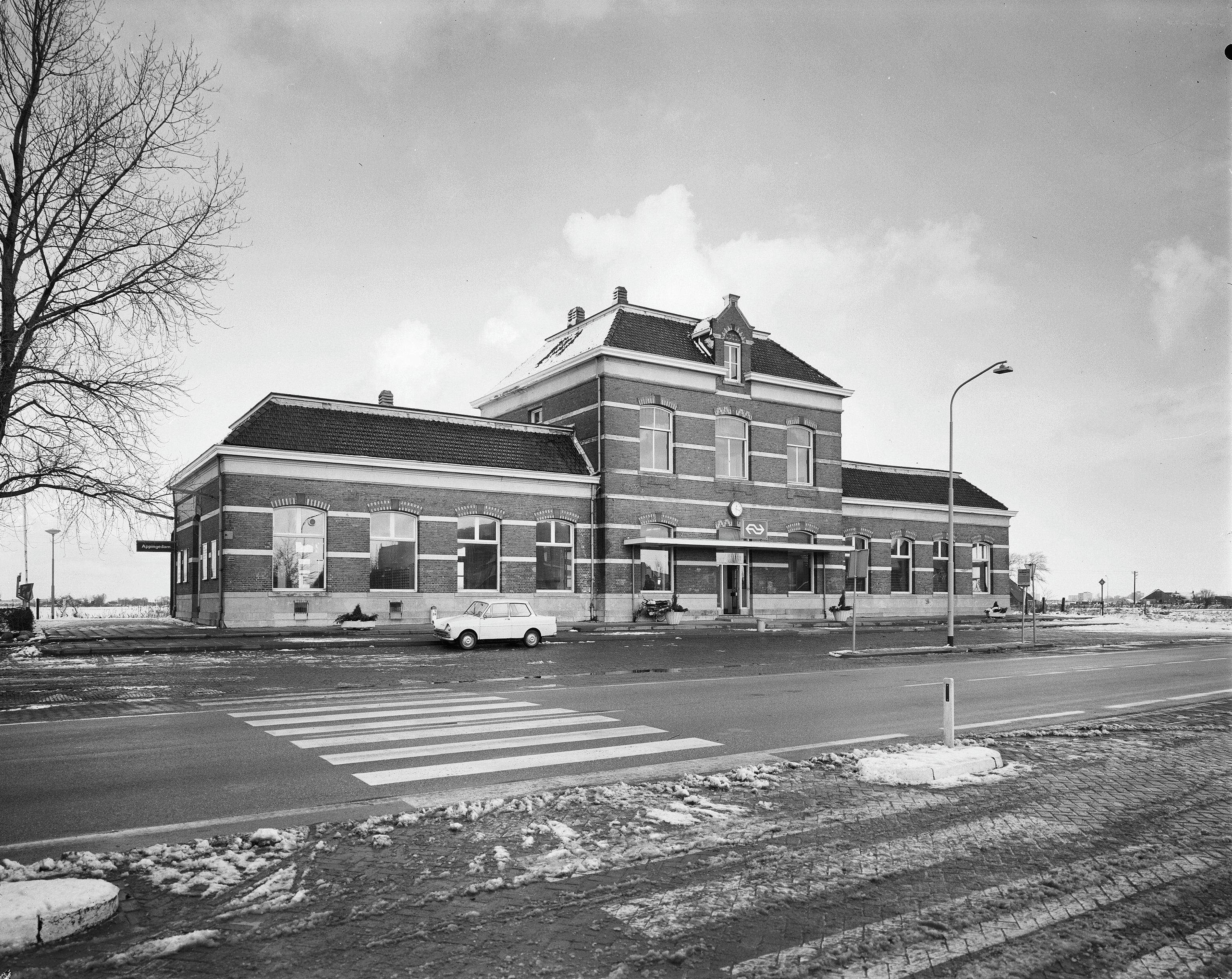 Voormalig treinstation Appingedam: voorgevel